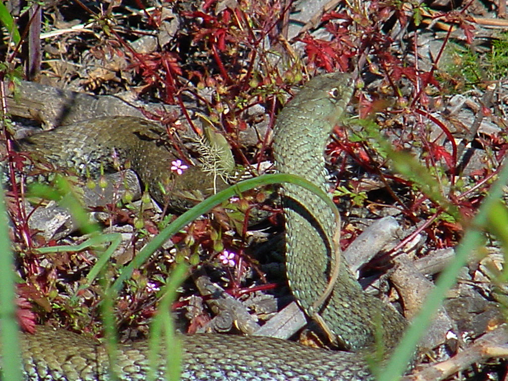 Couleuvre de Montpellier Malpolon monspessulanus